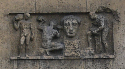 München, Alter Botanischer Garten: Kunstpavillon, Relief über dem Portal